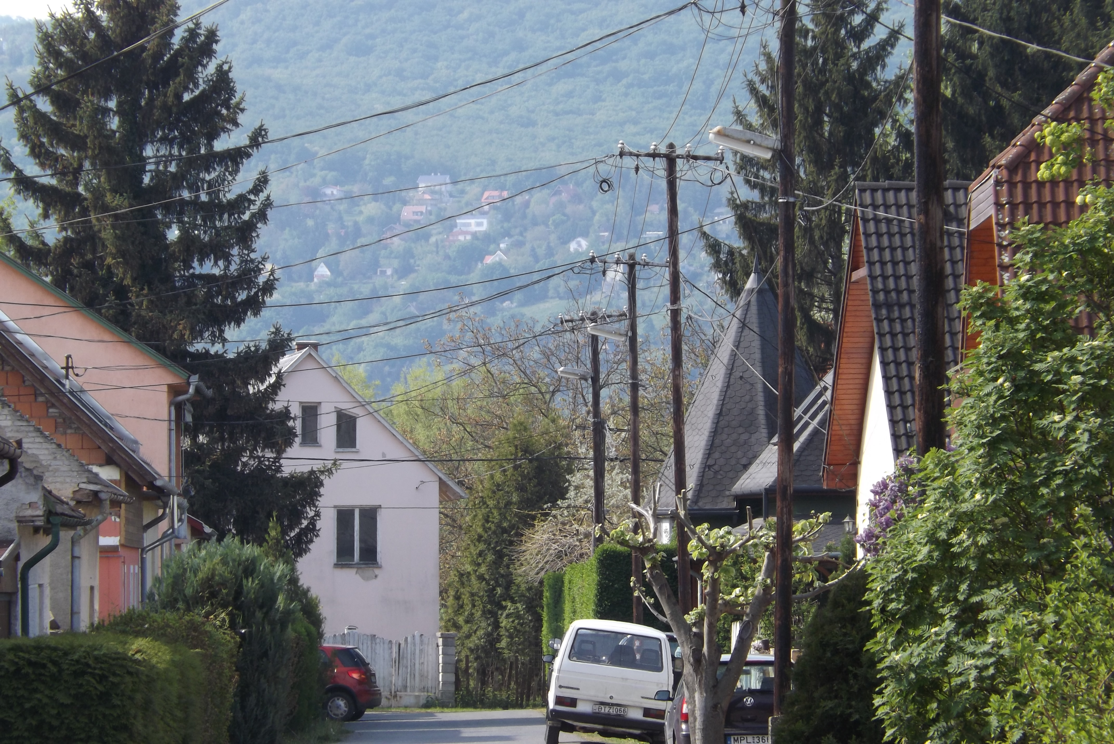 Kismaros látképe